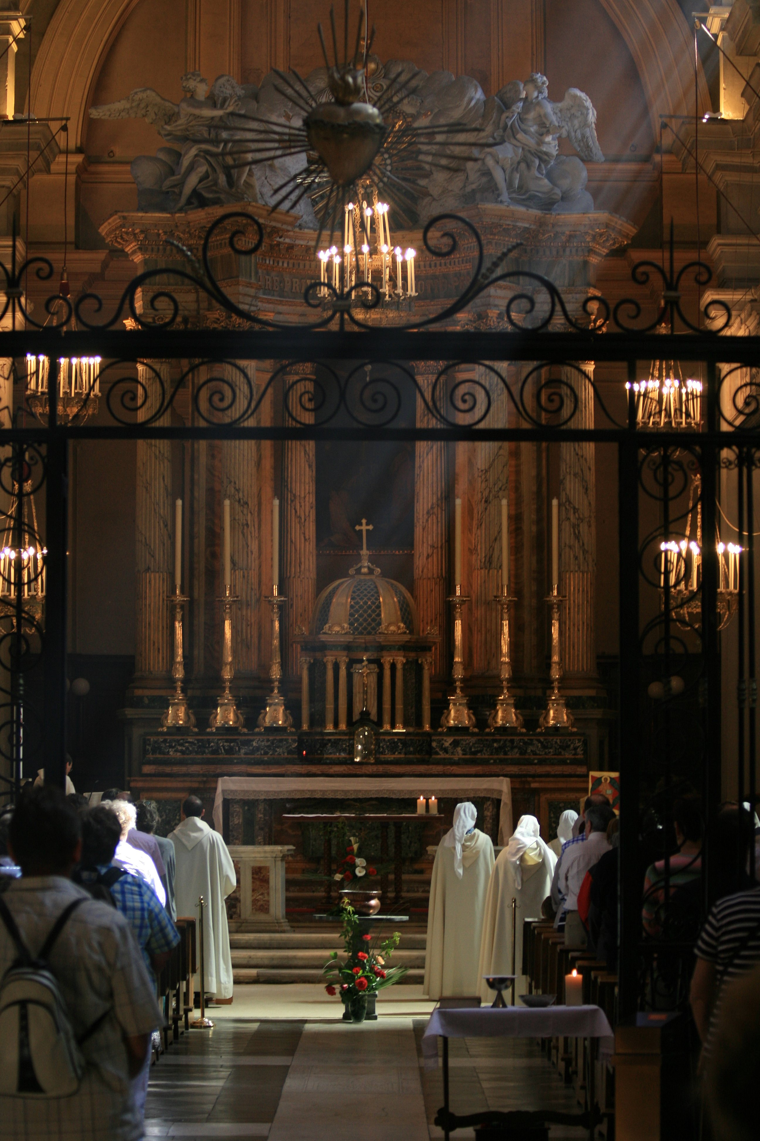 Service at Trinità dei Monti